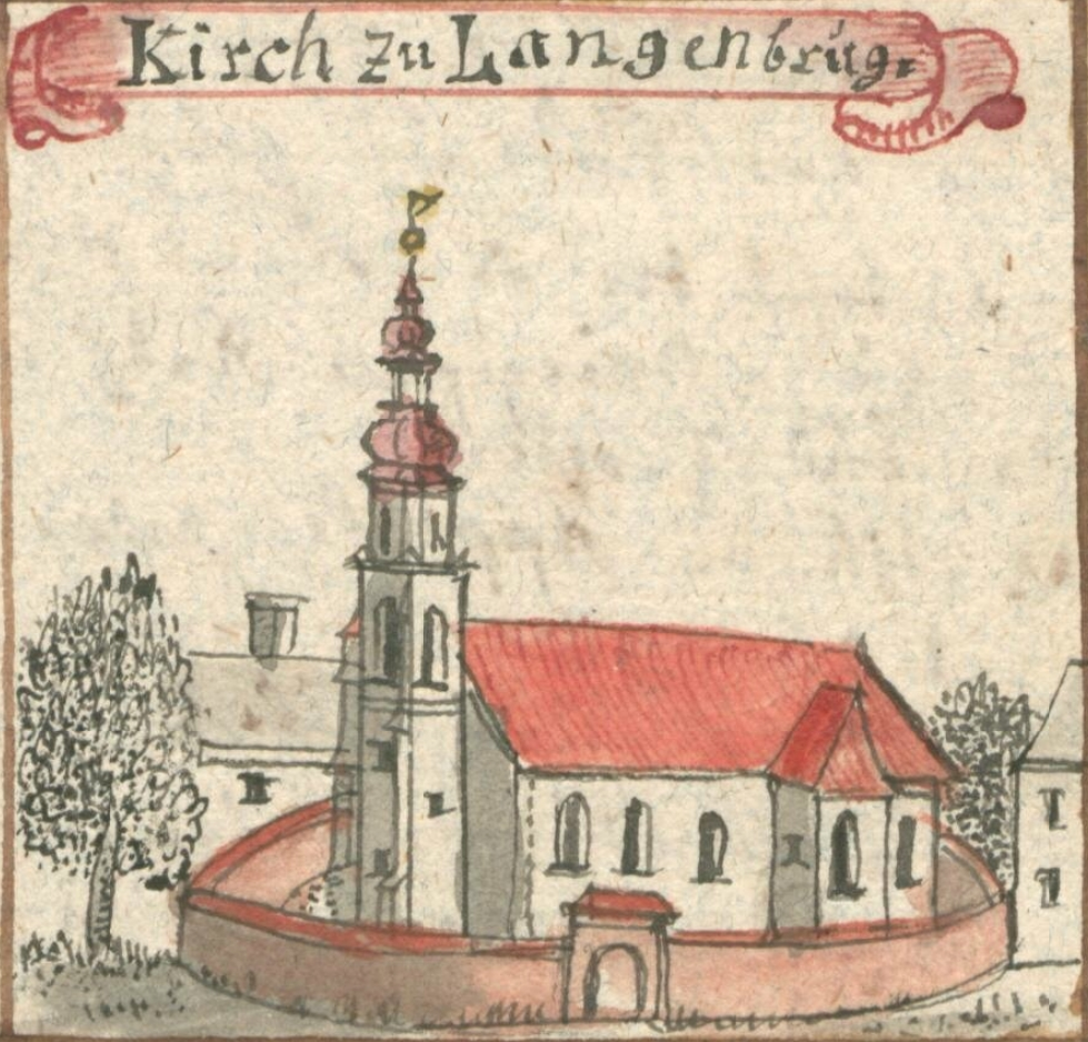 Kirch zu Langenbrück